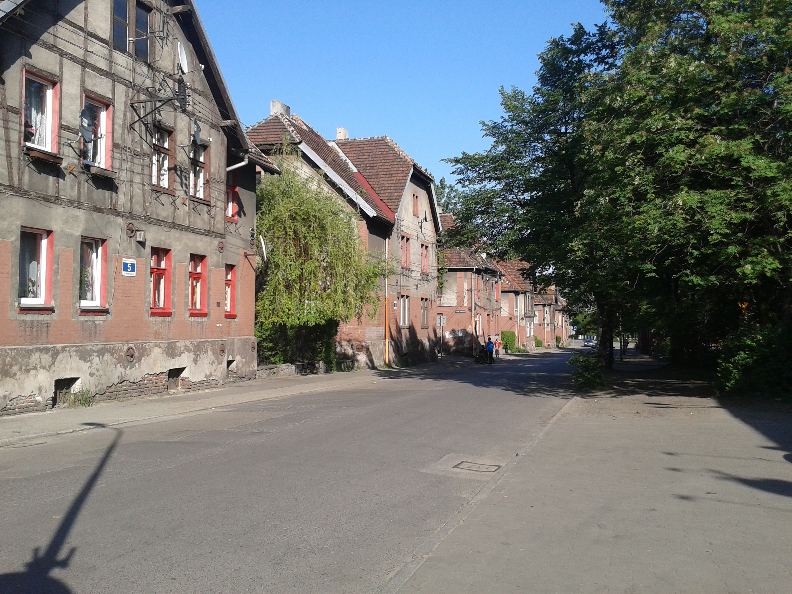 Bobrek ul. Wytrwałych 5, 6 i inne numery.